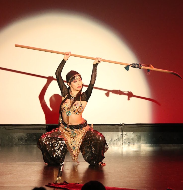 日本ベリーダンスフェスティバル2018(東京)にて薙刀の舞を披露するJasmine